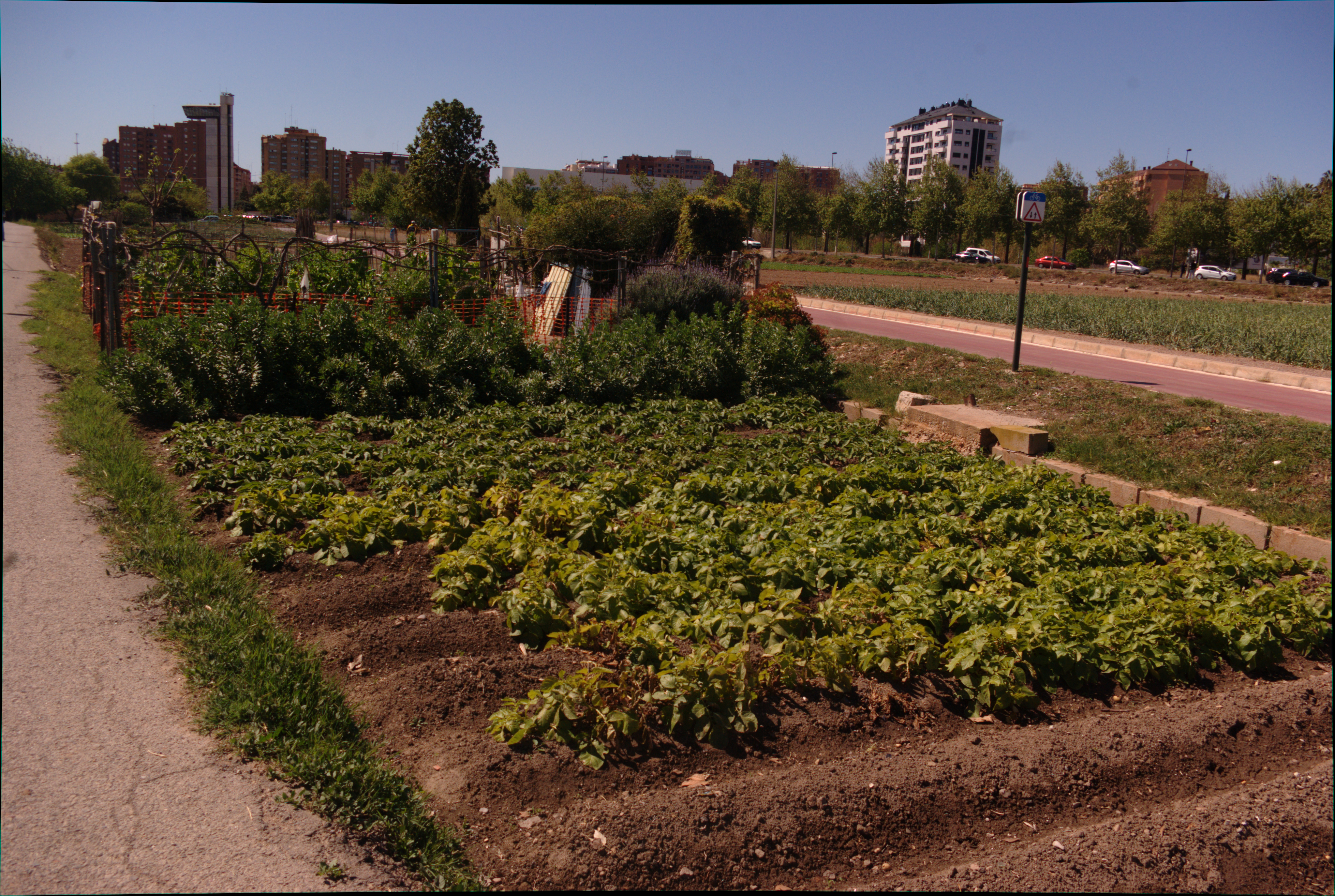 Huerta junto a la Ronda Norte, en el barrio de Benimaclet (Valencia), junto al cementerio y la Via Xurra.